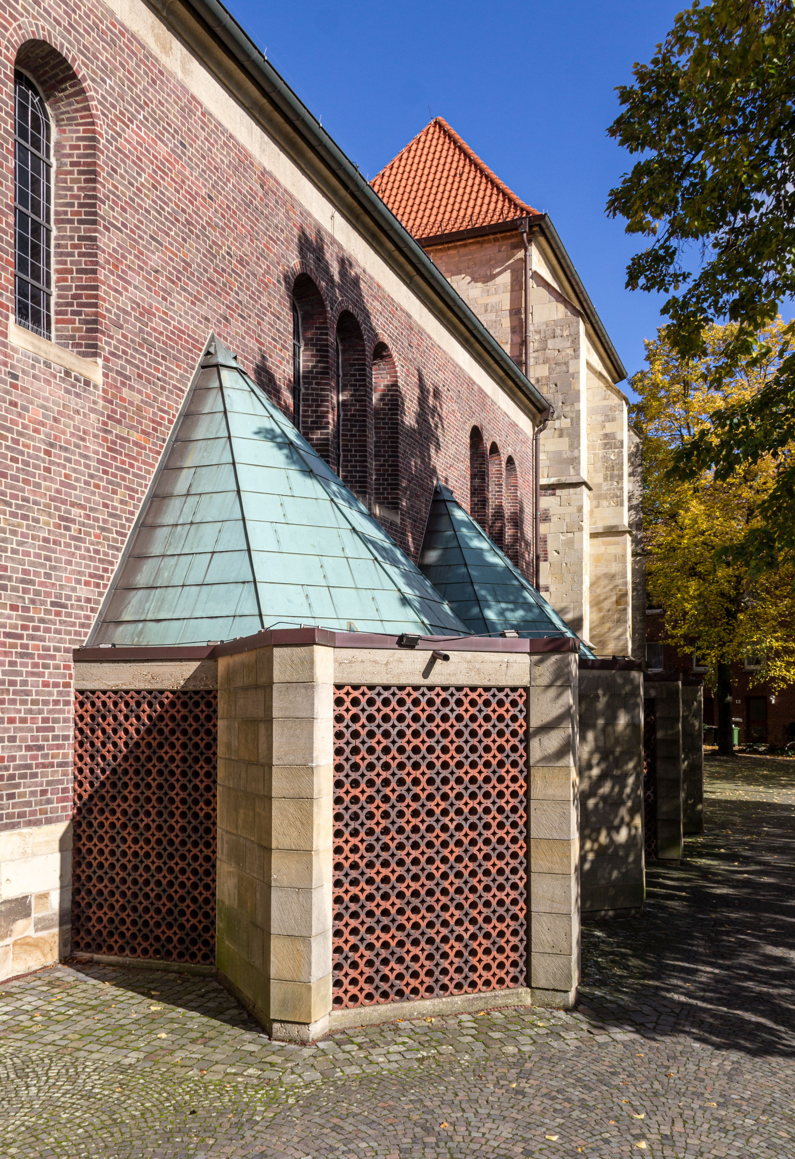 St.-Viktor-Kirche, Seitenansicht (zur Lüdinghauser Straße), Dülmen, Nordrhein-Westfalen, Deutschland This image shows a heritage building in Germany, located in the North Rhine-Westphalian city Dülmen (no. 15).